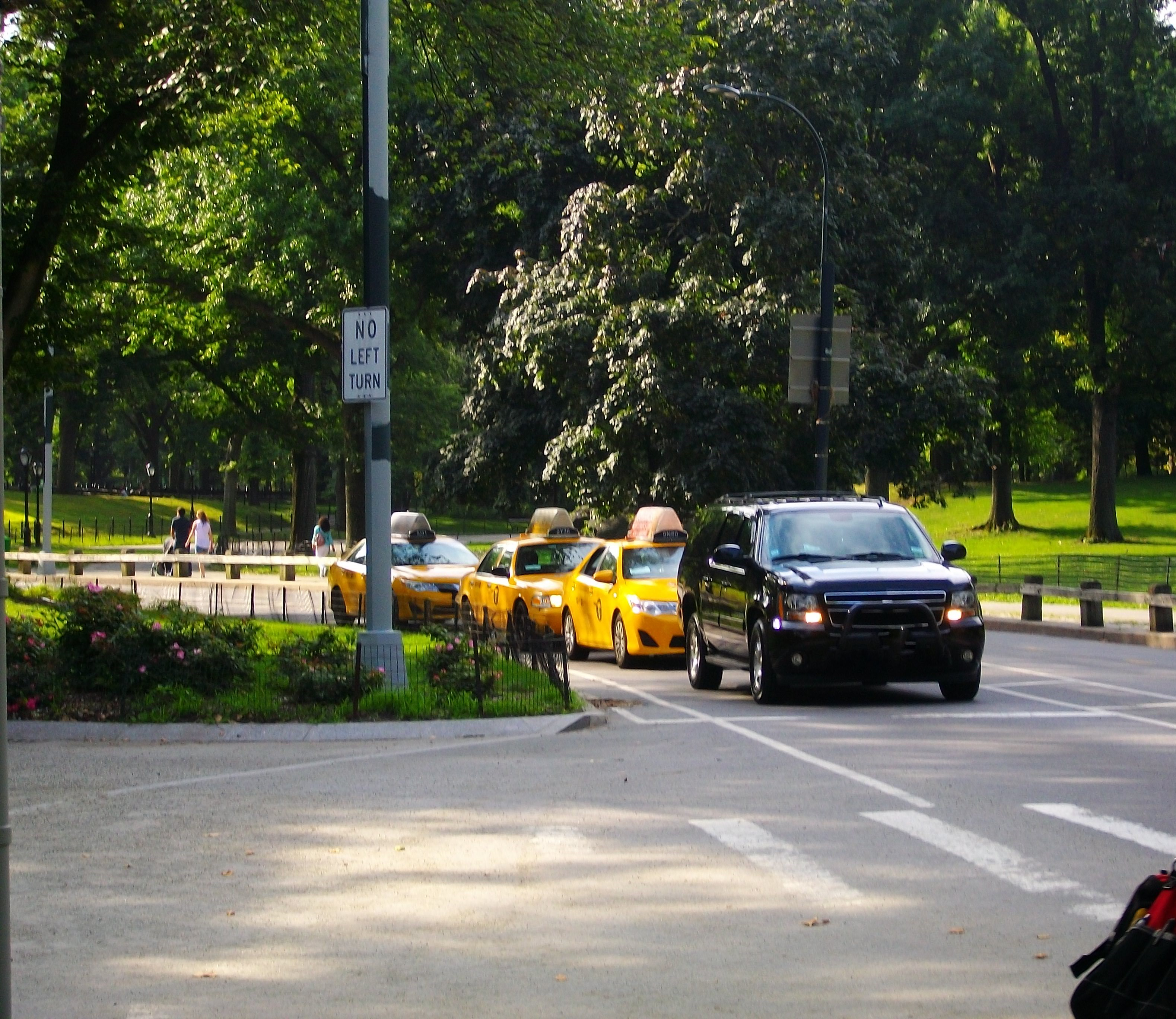 Taxis roulant dans Central Park.